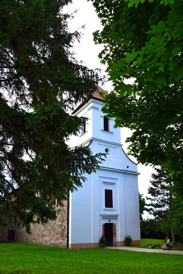 Tereske - árpád-kori római katolikus templom